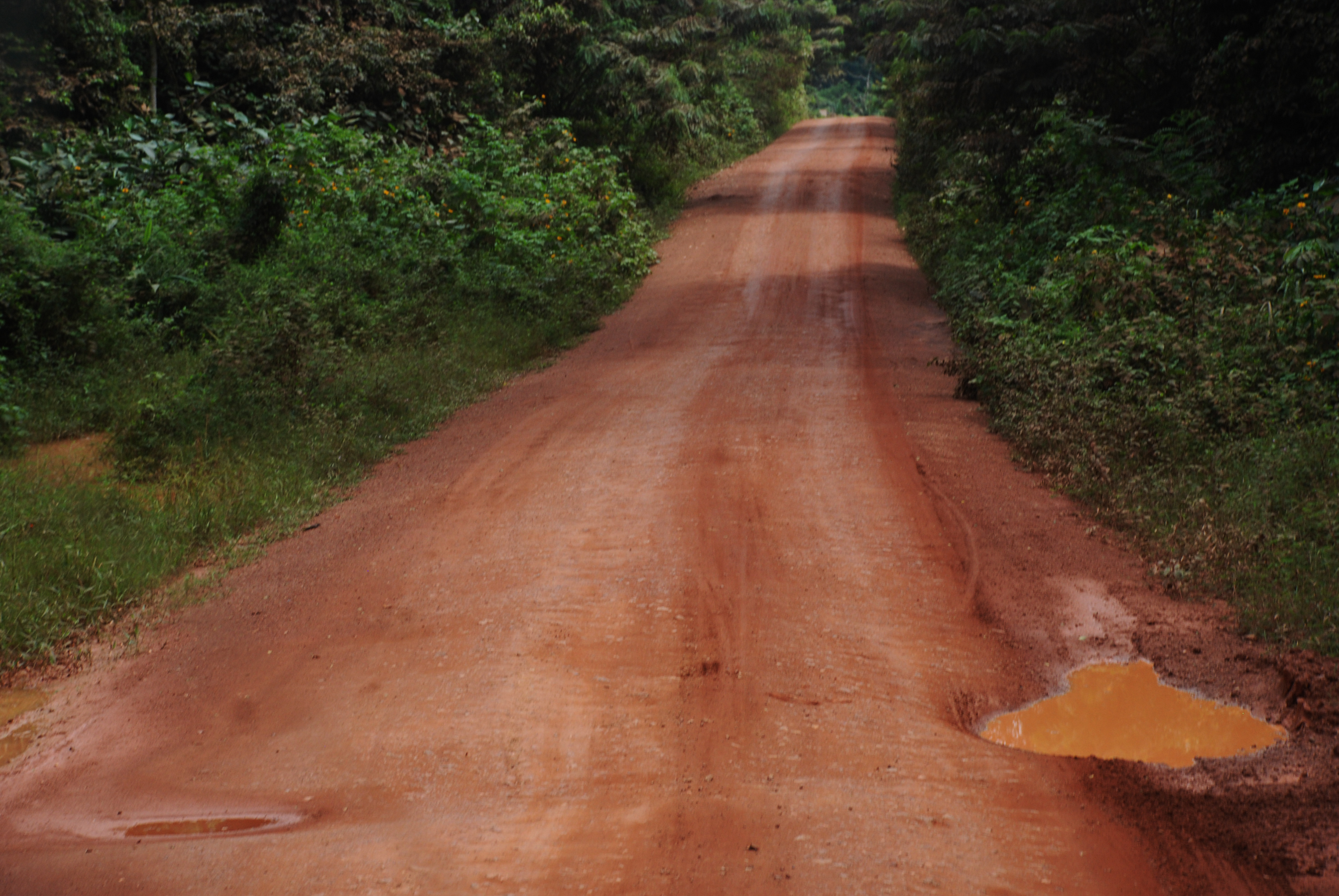 Route non bitumée dans la localité de Yokadouma dans la région de l'Est du Cameroun